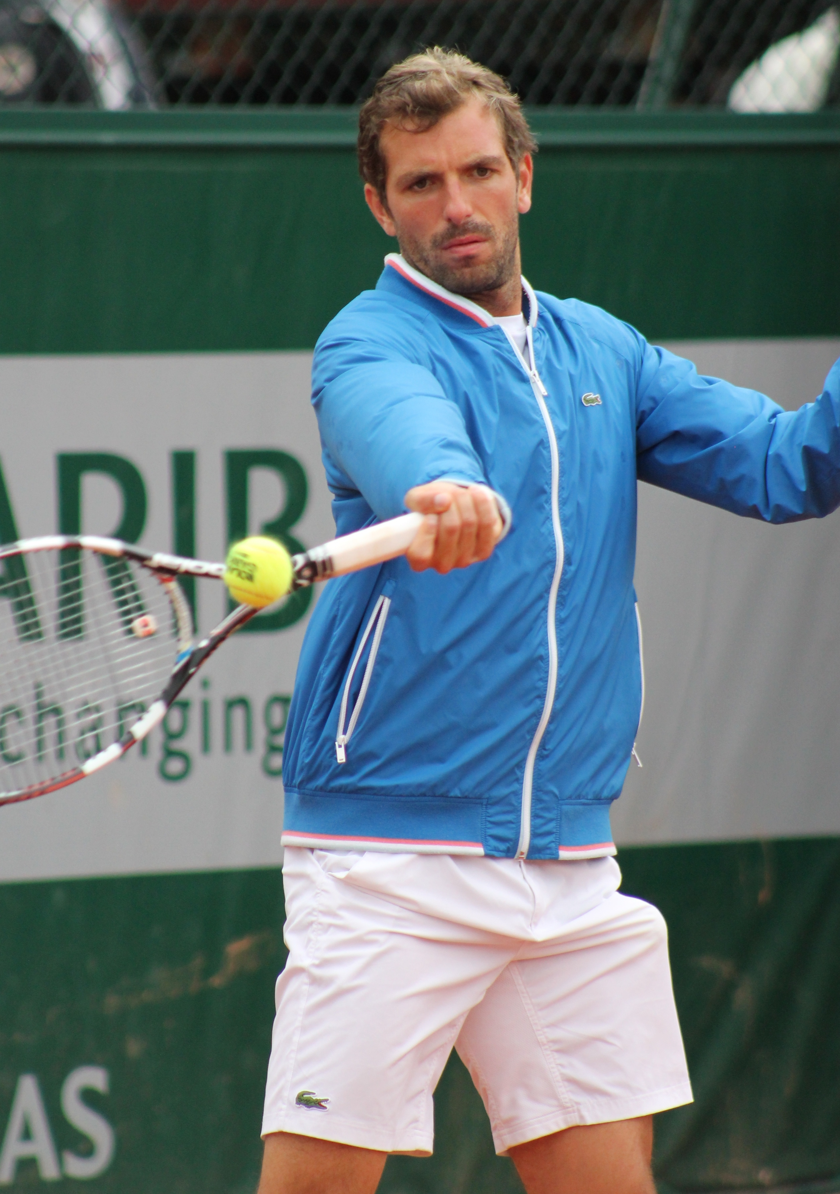 Julien Benneteau